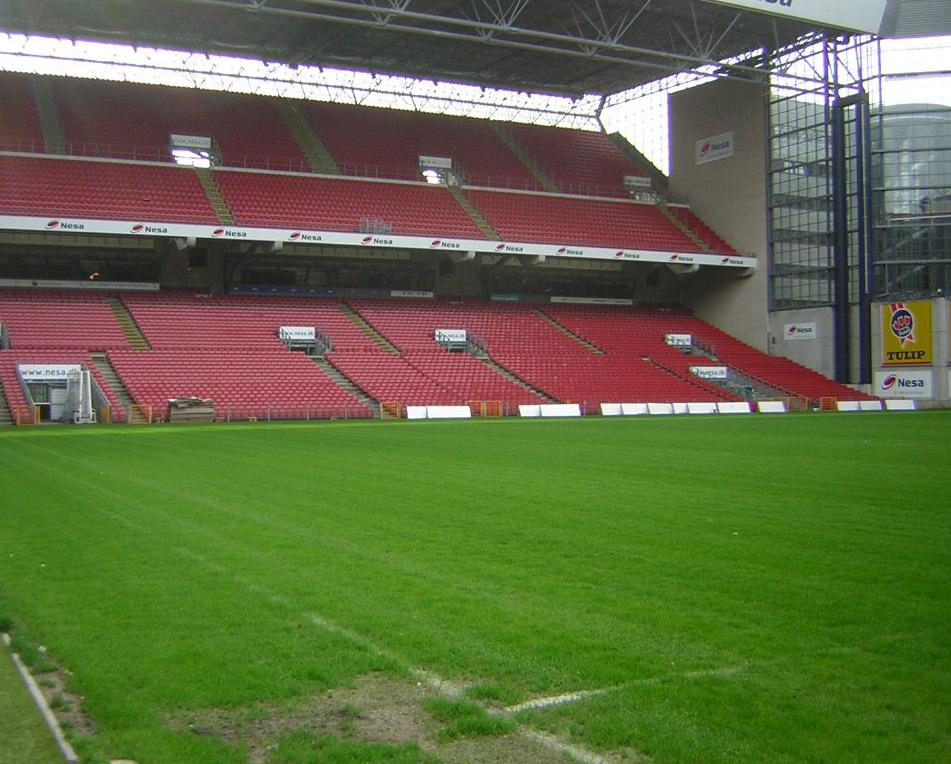 Parken Stadium, Copenhagen, Denmark